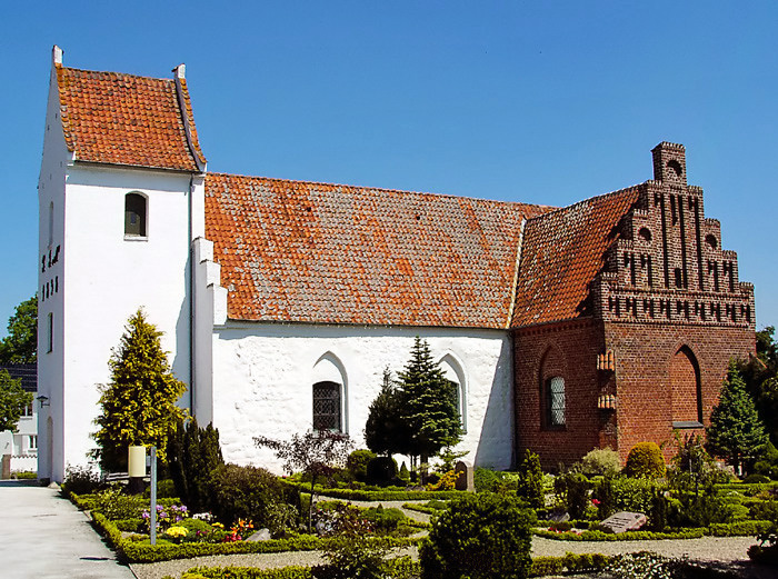 fra syd